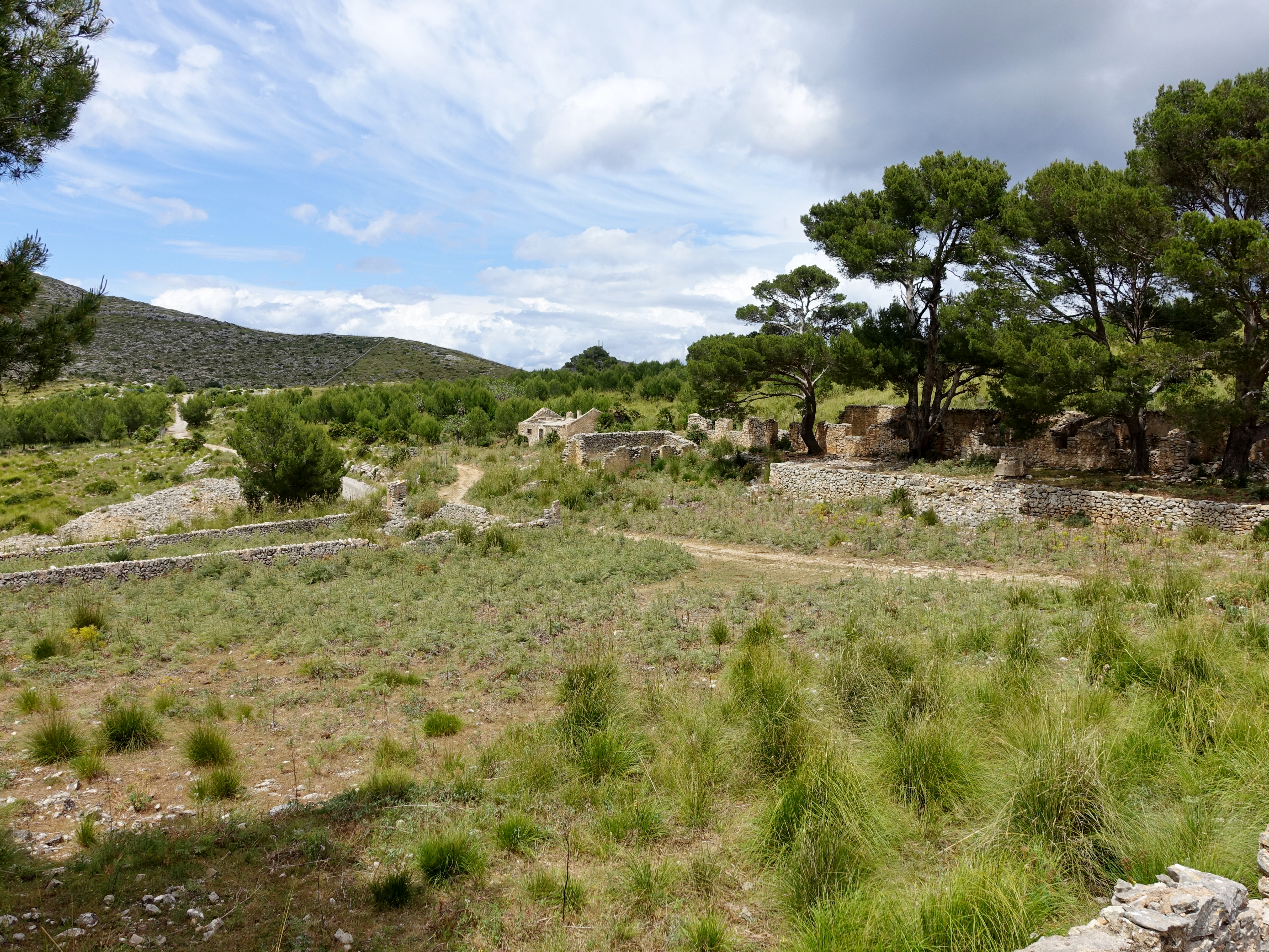 Campament dels Soldats, Gemeinde Artà, Mallorca, Spanien